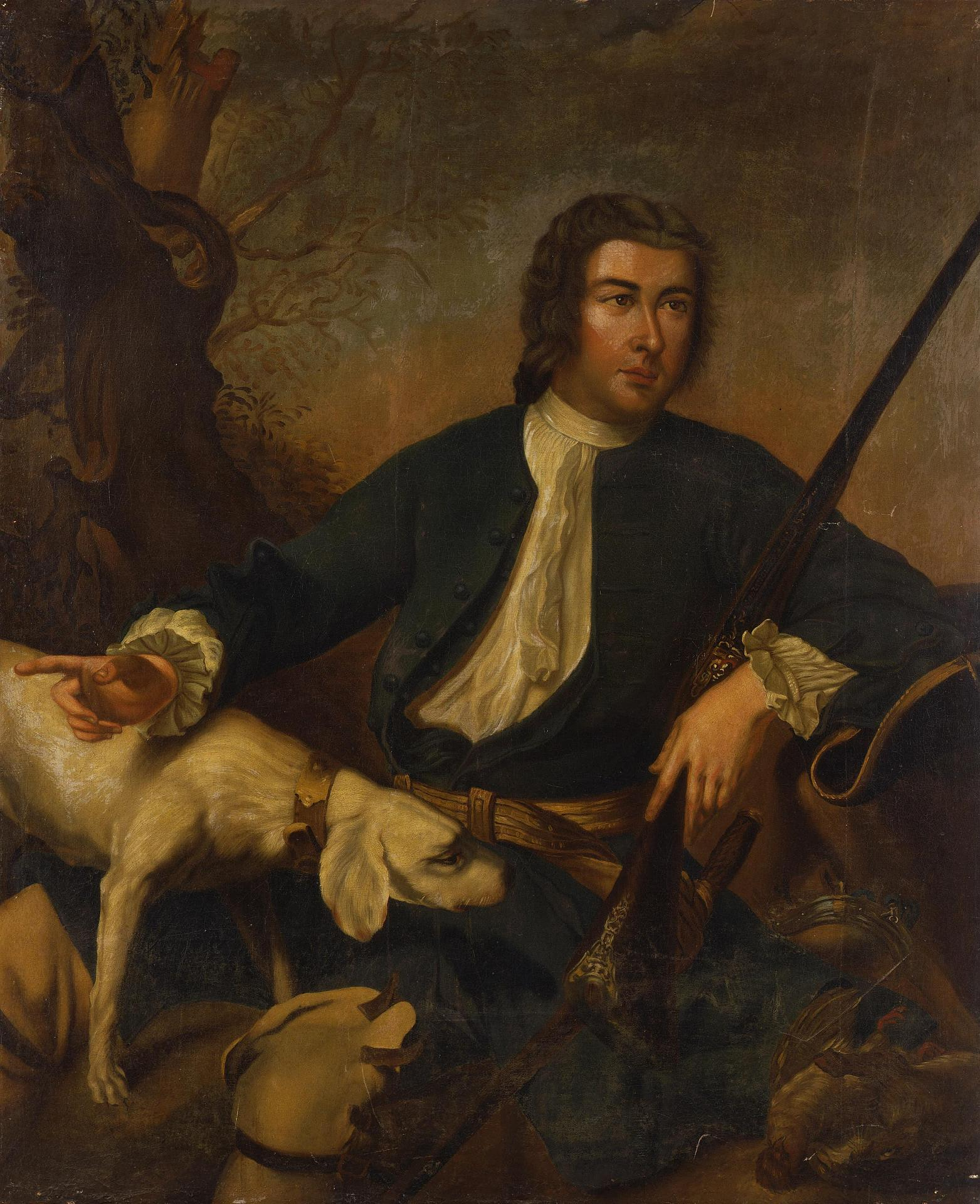 Портрет графа Никиты Ивановича Панина